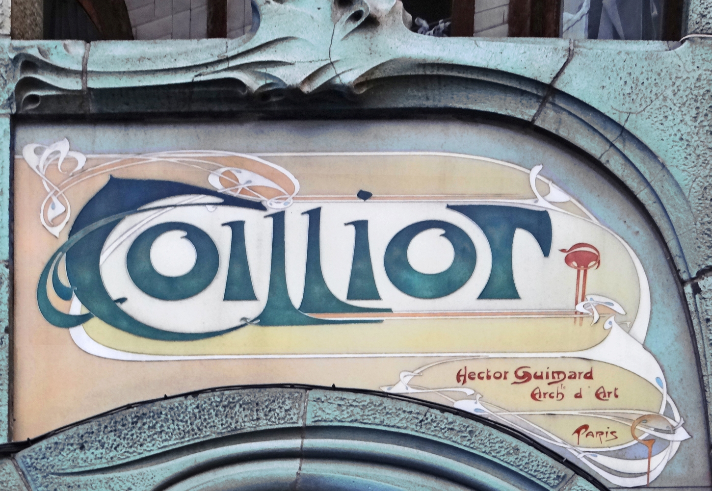 L'enseigne de la Maison Coilliot conçue par Hector Guimard à Lille Construite entre 1898 et 1900 sur les plans de l'architecte d'art Hector Guimard, la maison Coilliot est un manifeste de l'Art Nouveau. Elle a été imaginée à la demande du céramiste Coilliot, soucieux de mettre en valeur son propre savoir-faire : la lave émaillée. Hector Guimard réalise une maison-affiche où le matériau vert est mis en valeur pour en faire cette façade atypique, comprenant toutes les caractéristiques de l'art nouveau à la française. Extrait du site Article de Wikipedia sur la Maison Coilliot à Lille